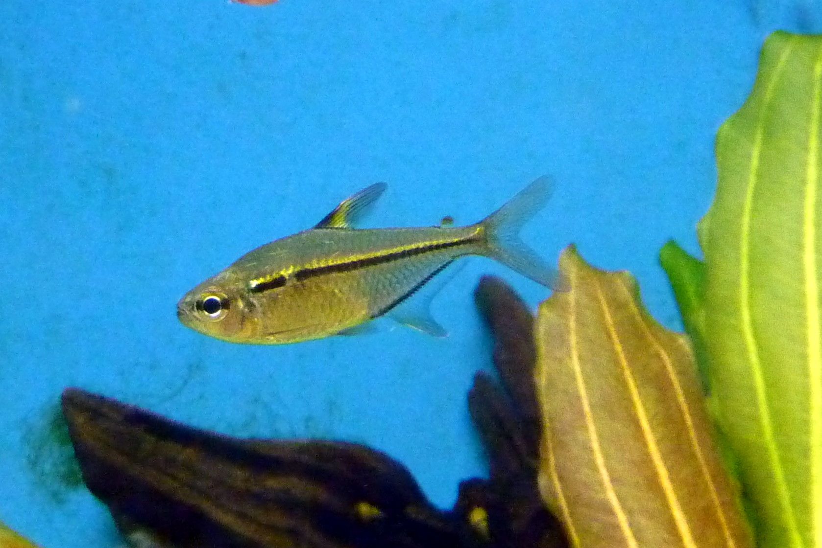 Flaggensalmler (Hemigrammus ulreyi) o. Hyphessobrycon sp. "paraguay"